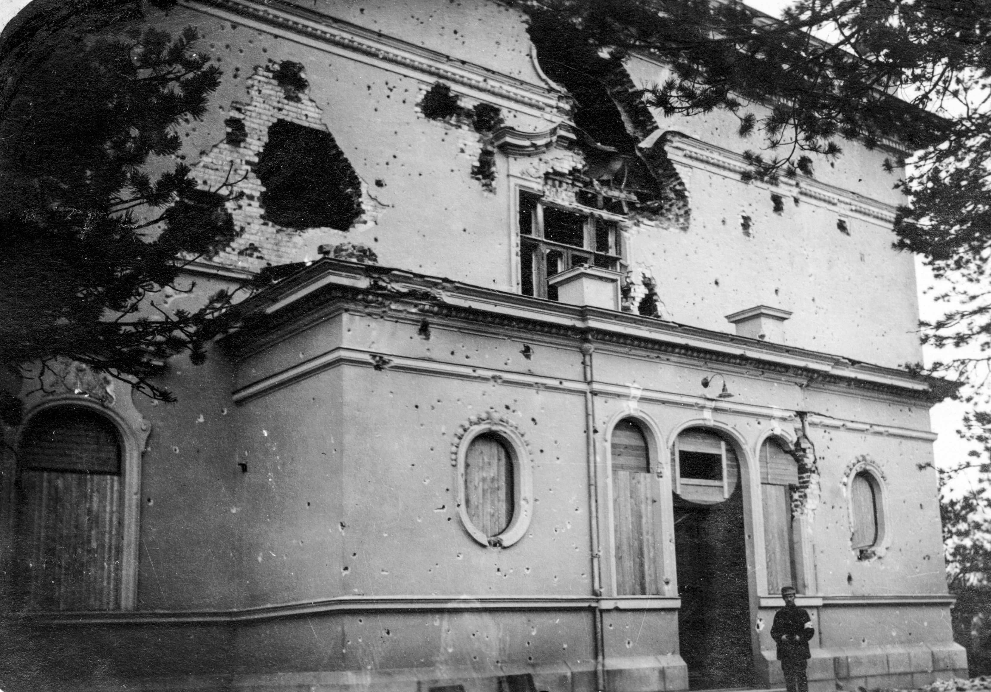 Näsilinna ja siellä sijainnut Hämeen museo kärsivät pahoja vaurioita 3.-4.4.1918 käydyissä taisteluissa. CC-BY Tampere 1918, kuvaaja tuntematon, Vapriikin kuva-arkisto. Finnish Civil War 1918, Photographer unknown, Vapriikki Photo Archives.